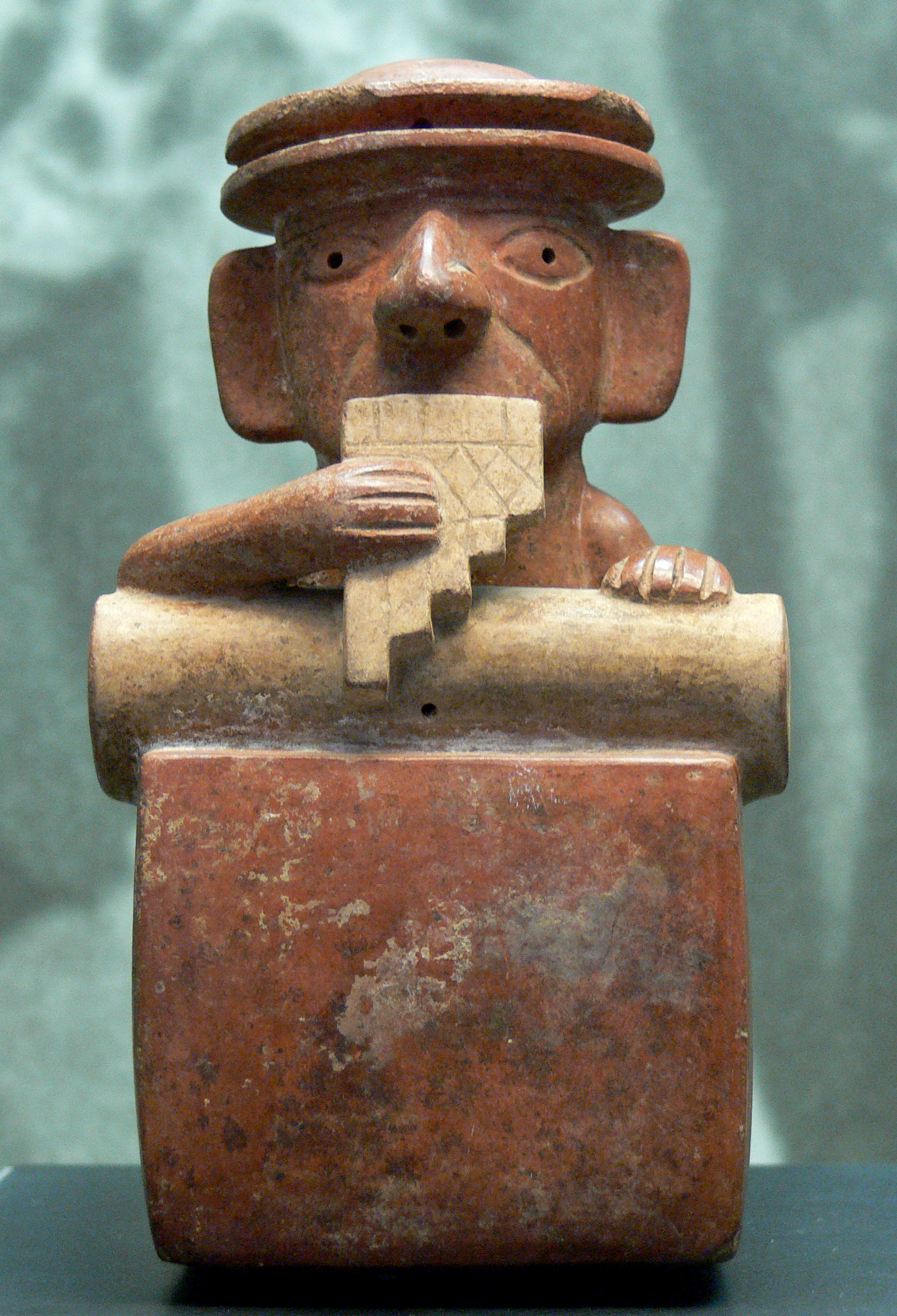 Schaffhausen, Museum zu Allerheiligen, Sammlung Ebnöther (Abteilung "Musik/Tanz") Panflötenspieler, Tongefäss, Peru, nördliche Küstenregion, Moche, 100 v. Chr.–600 n. Chr.